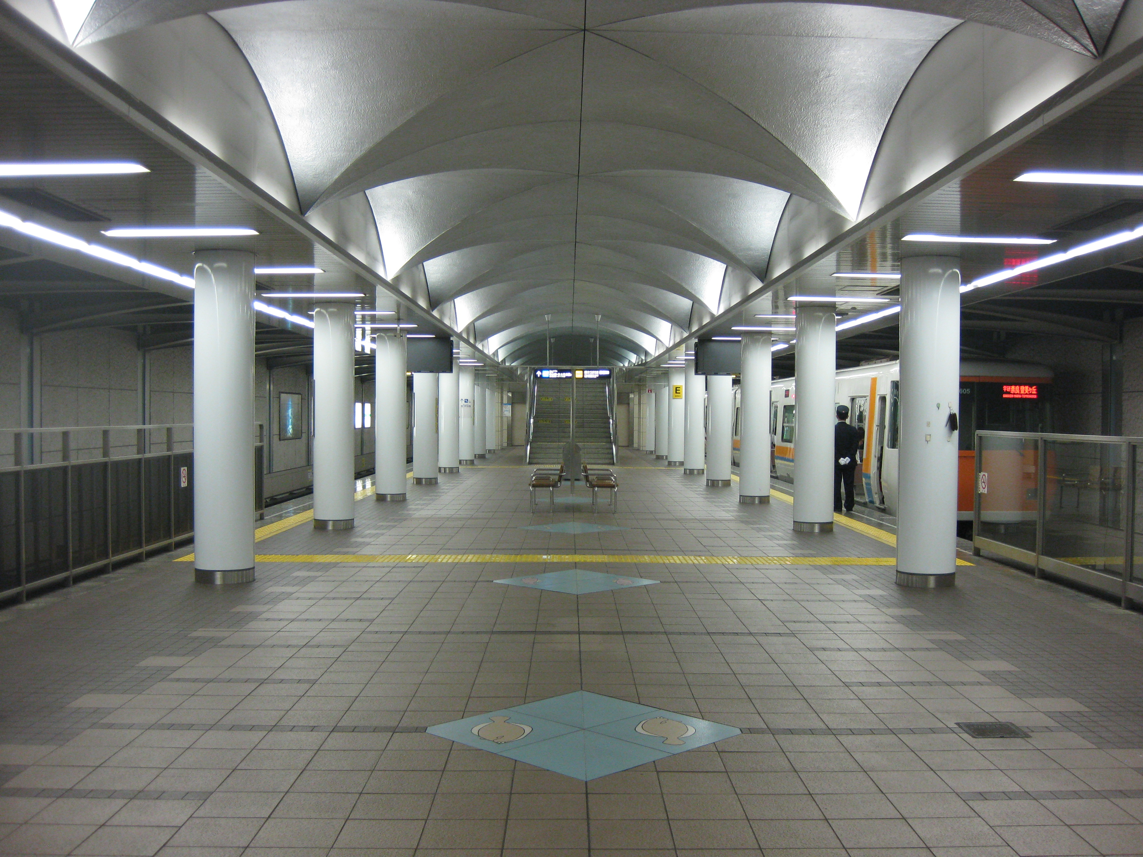 コスモスクエア駅地下鉄中央線プラットホーム